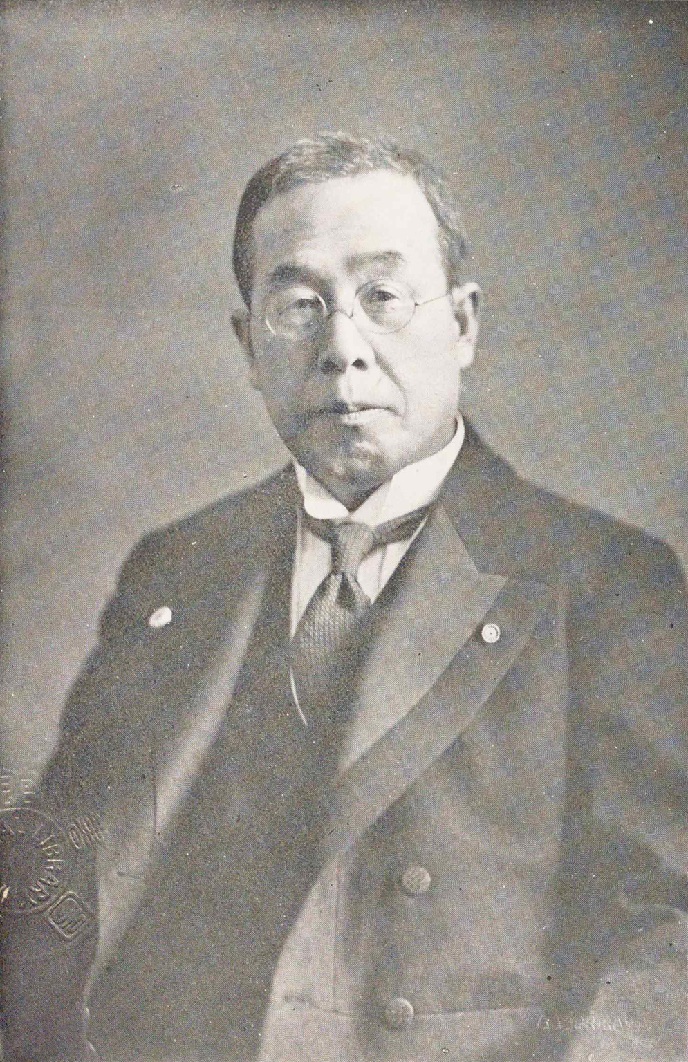 Portrait of Kuhara Fusanosuke (久原房之助, 1869 – 1965)